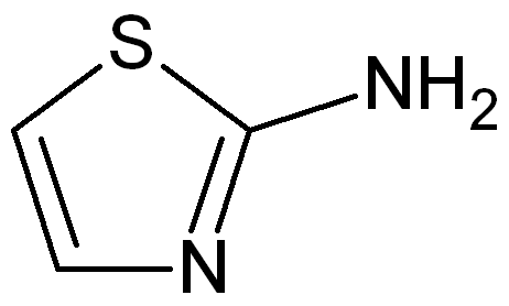 2-aminothiazool